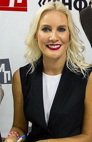 Елена Летучая во время посещения Улан-Удэ 22 мая 2015 года.